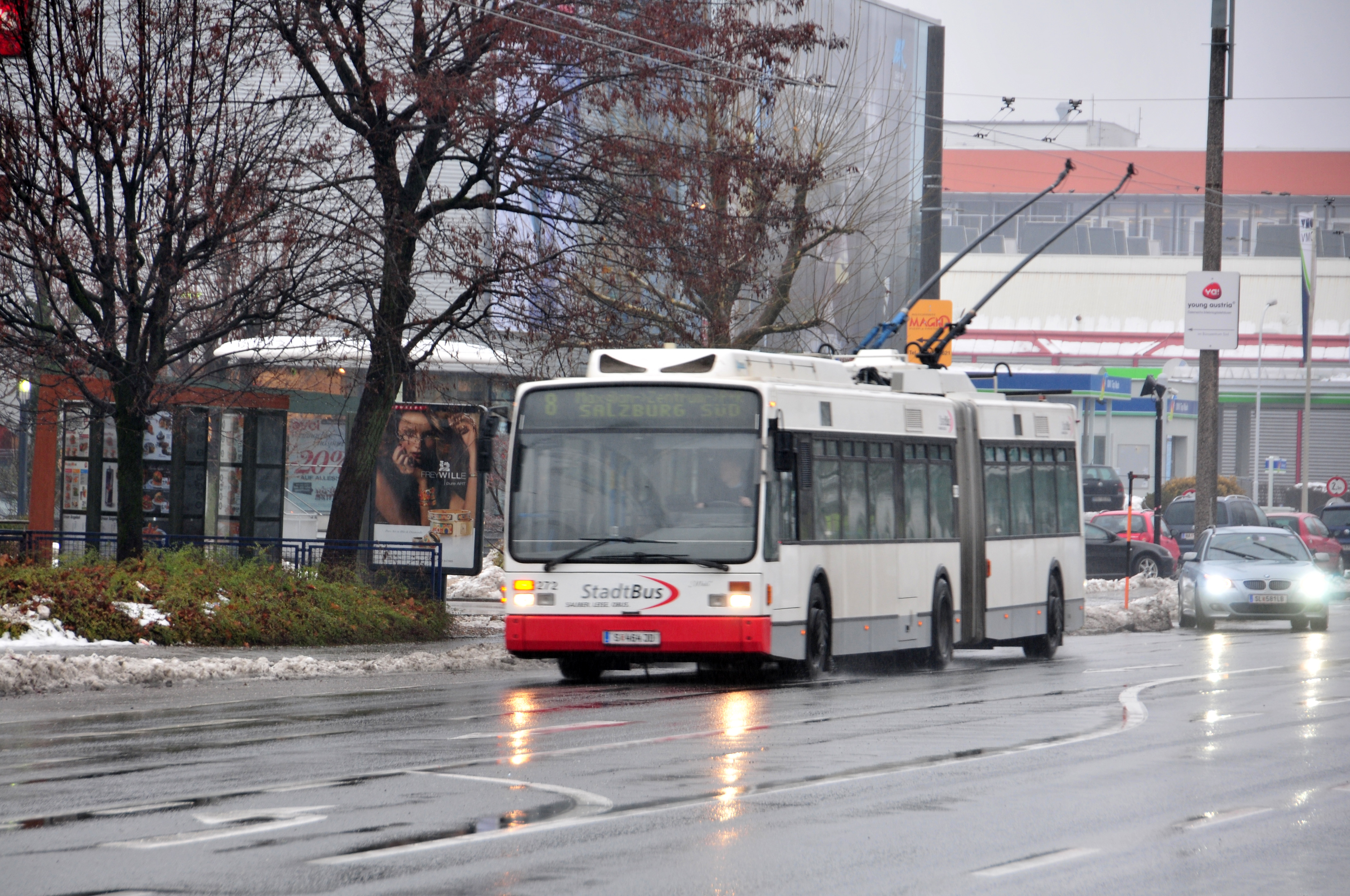 Oberleitungsbus Salzburg